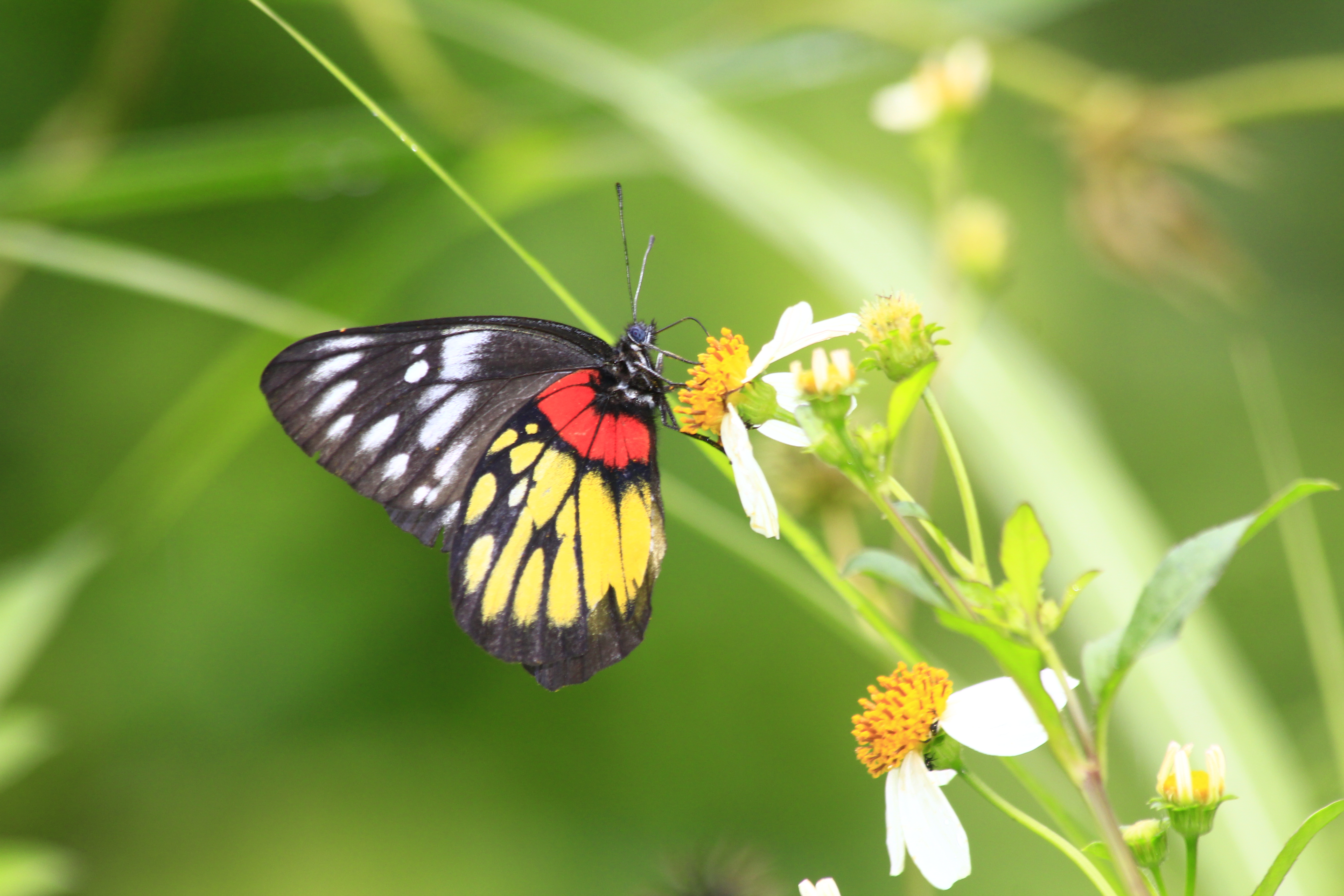 106紅肩粉蝶7(郭月秀攝)